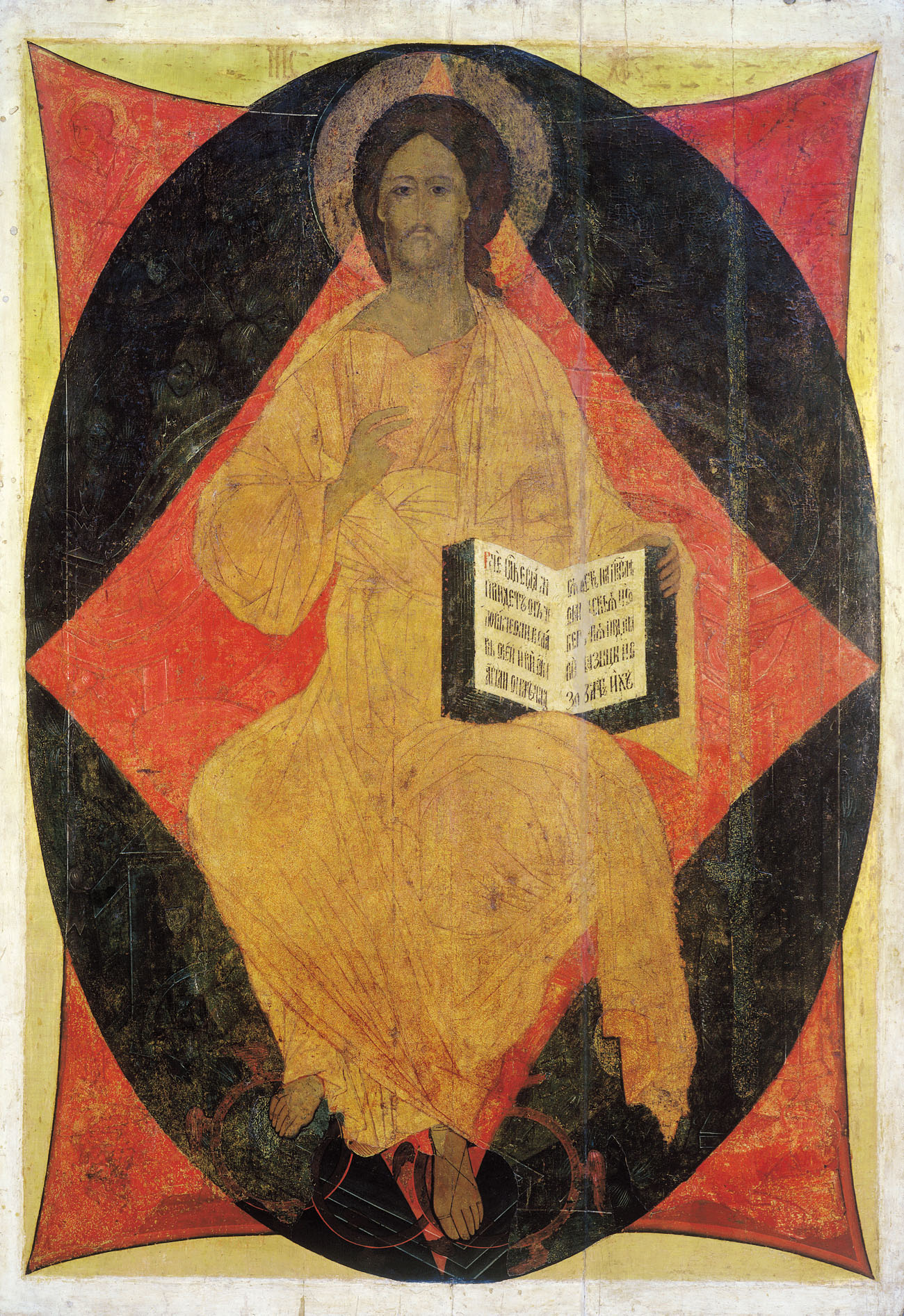 Спас в силах Из деисусного чина Рублев Андрей c помощниками Школа или худ. центр: Москва 1408 г. 314 × 220 см Государственная Третьяковская галерея, Москва, Россия Инв. 22961 Из деисусного чина Успенского собора во Владимире.